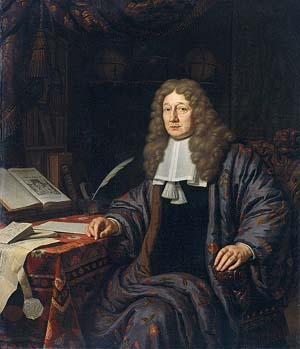 Portrait of Johannes van Waveren Hudde, burgemeester of Amsterdam and mathematician